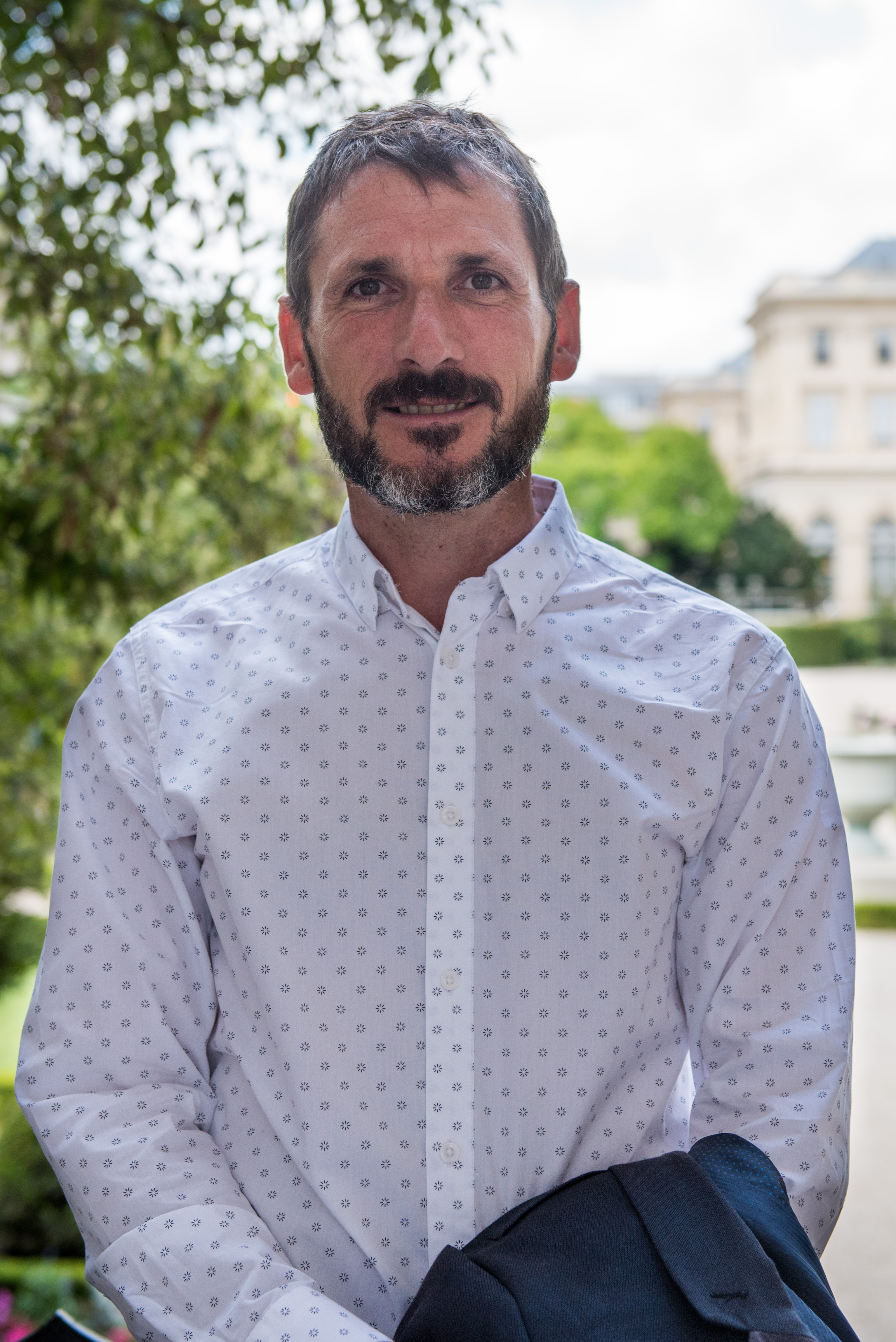 Matthieu Orphelin dans le jardin des Quatre colonnes du palais Bourbon en 2017.